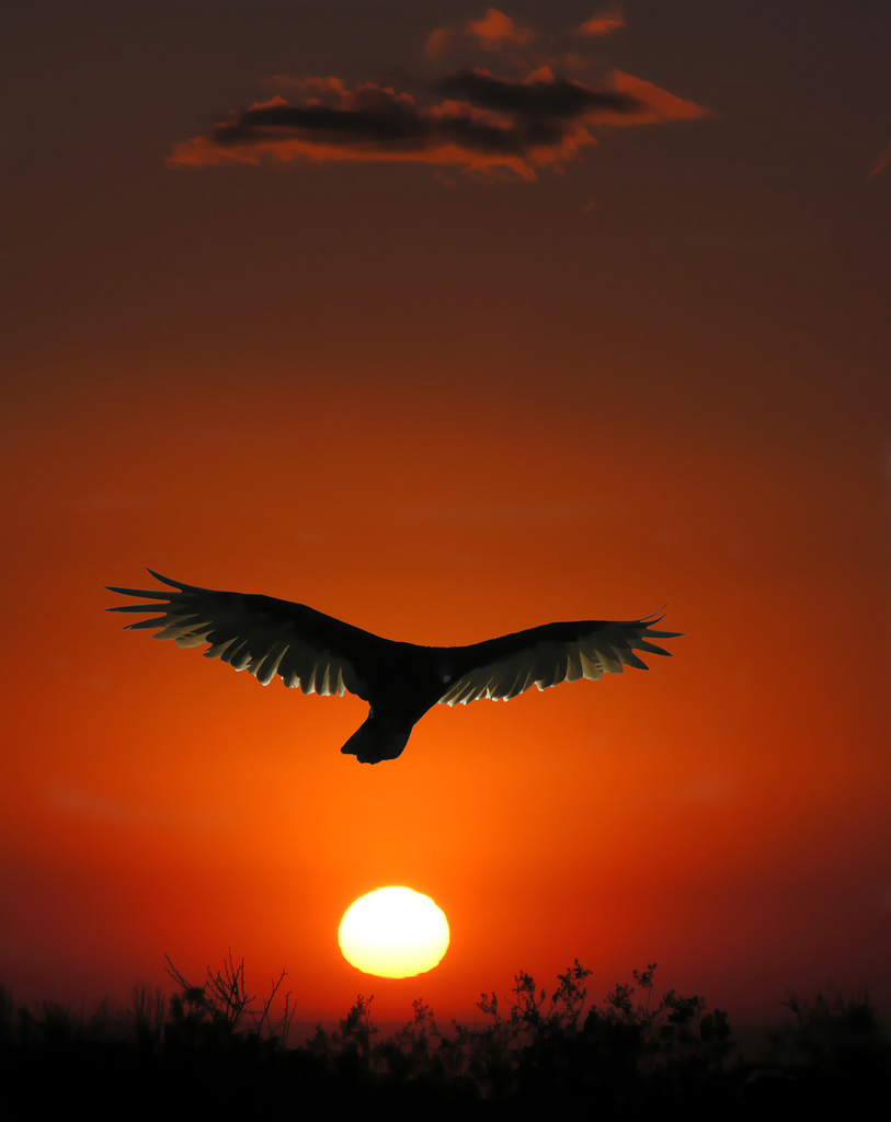 Condor en el Amanecer Mendoza-Argentina